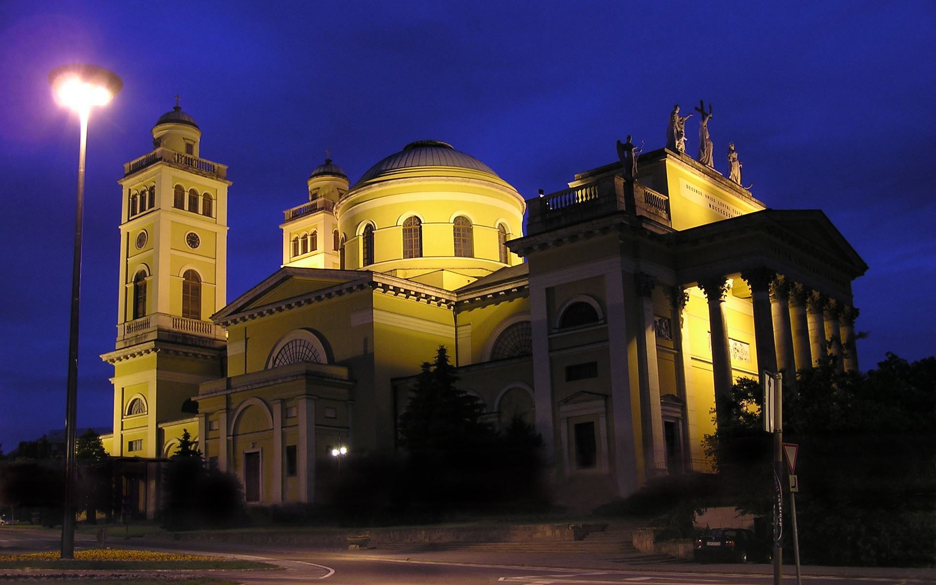 Nachbearbeitete Version von Image:Basilika eger.jpg